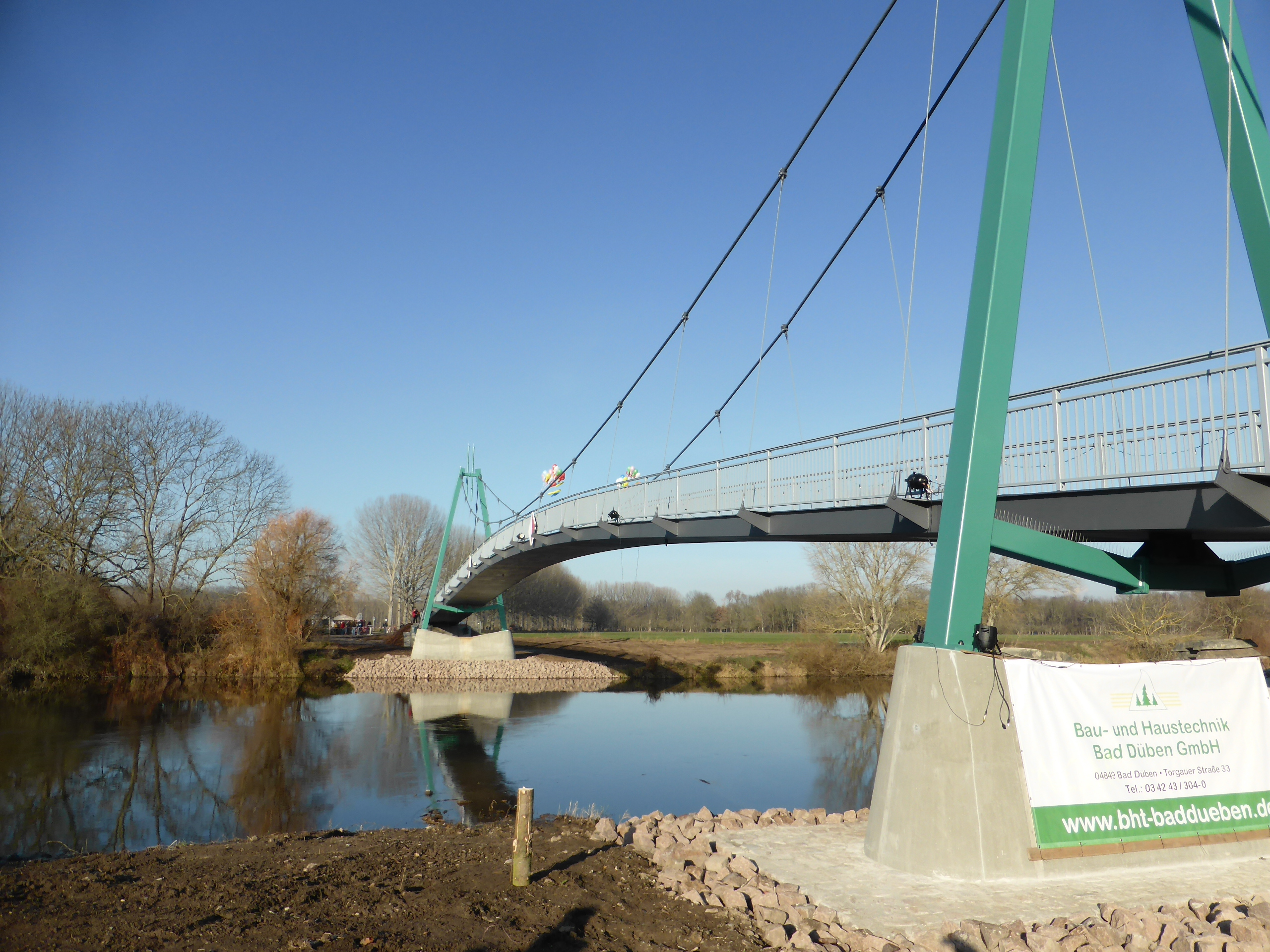 Saalebrücke in Leißling, welche die frühere Fährverbindung ersetzt. Auf der Fußgängerbrücke, die im Dezember 2016 eröffnet wurde, sind Radfahrer angehalten ihr Rad zu schieben.